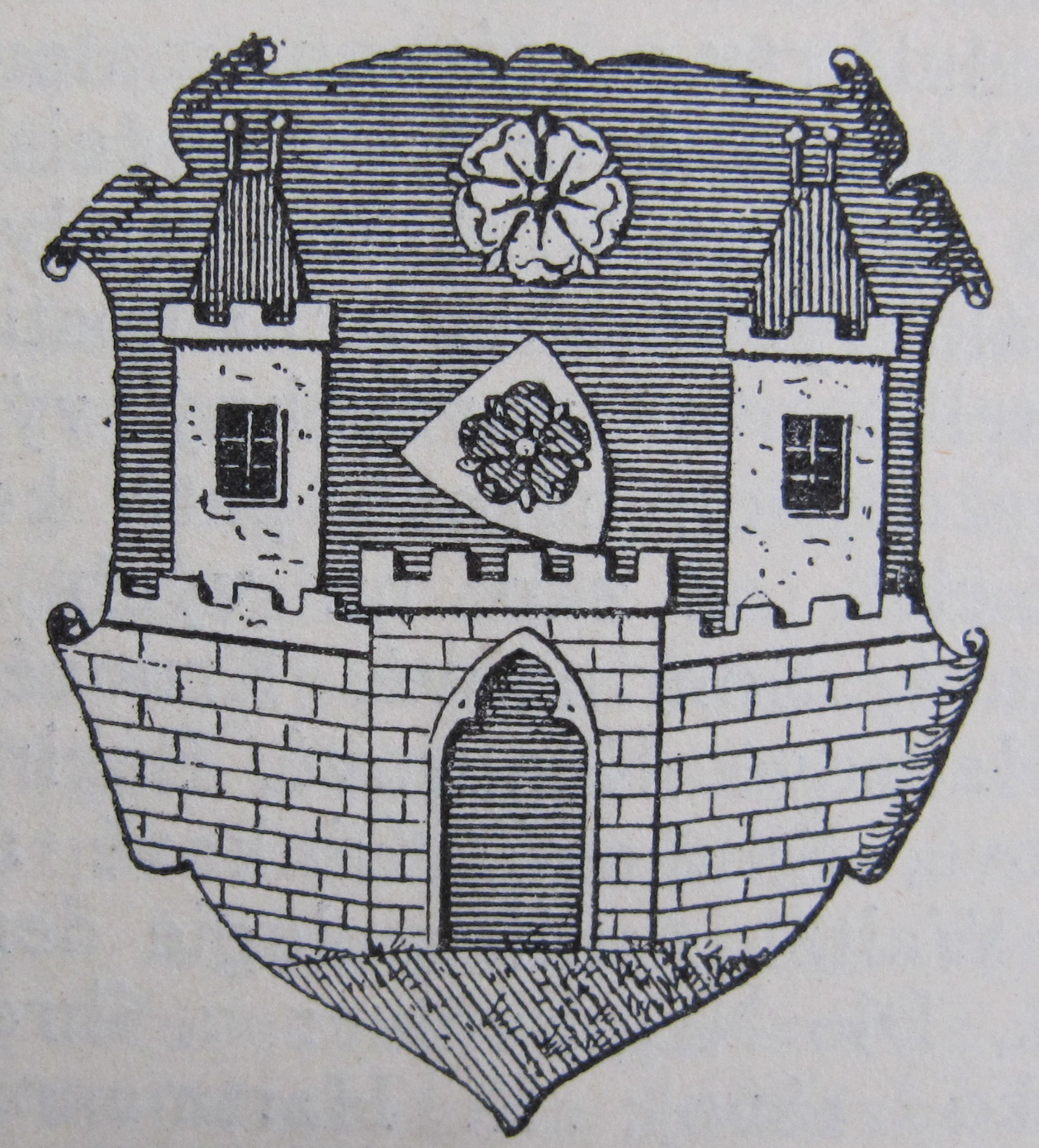 Původní popisek: Č. 963. Znak města Černovic.